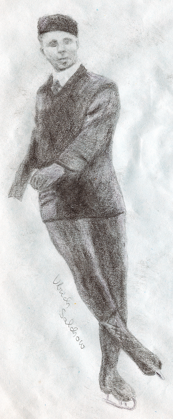 Ulrich Salchow - Figure Skater (Drawing) Source: Helena Grigar